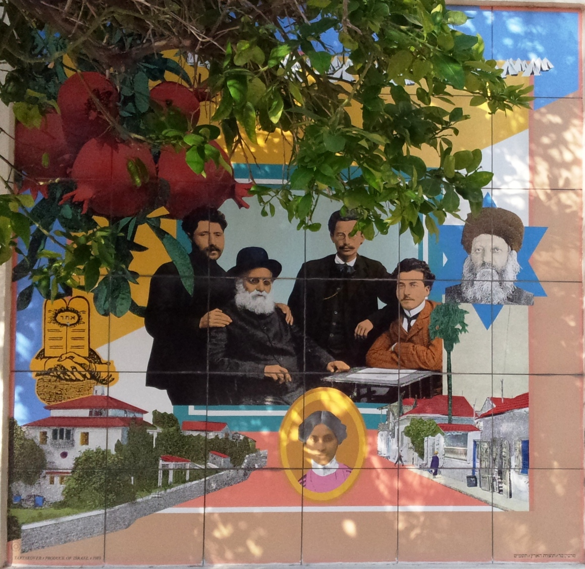 טרטקובר - תוצרת הארץ 1989 - חלק שמאלי: בדימוי מופיעים: הרב אברהם יצחק הכהן קוק, הסופרים: דבורה בארון, דוד שמעוני, ש"י עגנון, א"ז רבינוביץ', י"ח ברנר